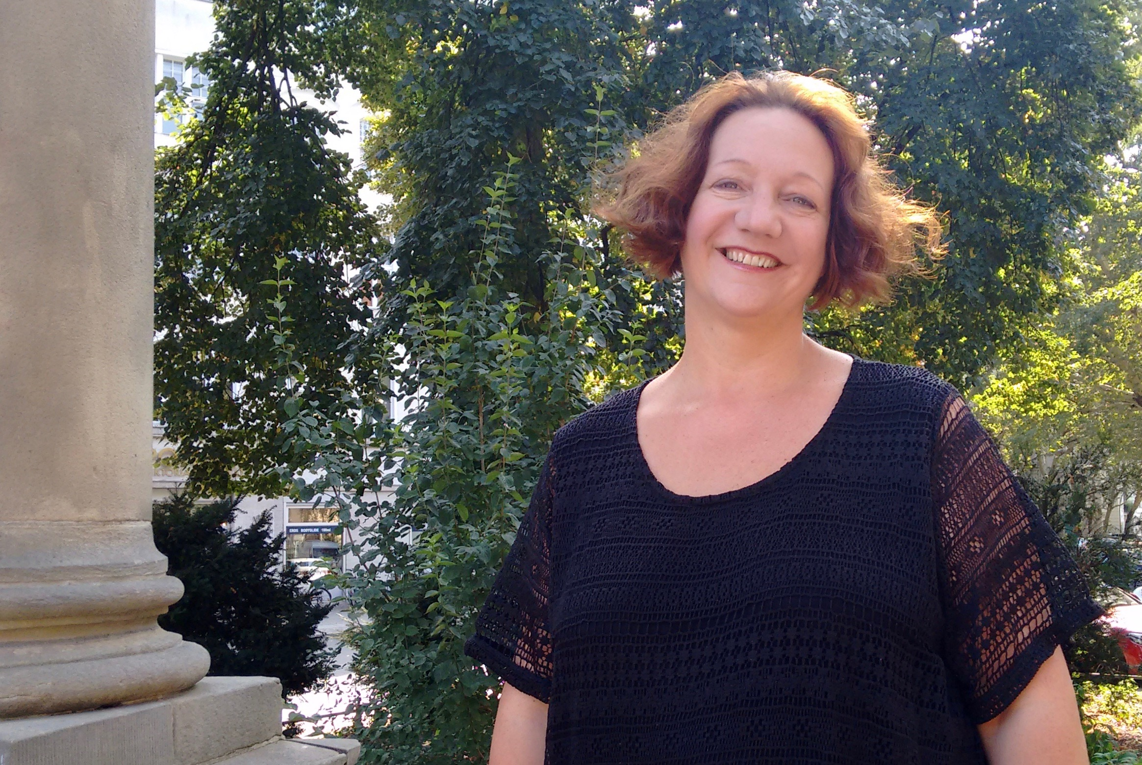 Sandra Leupold, Opernregisseurin, in Berlin im August 2018